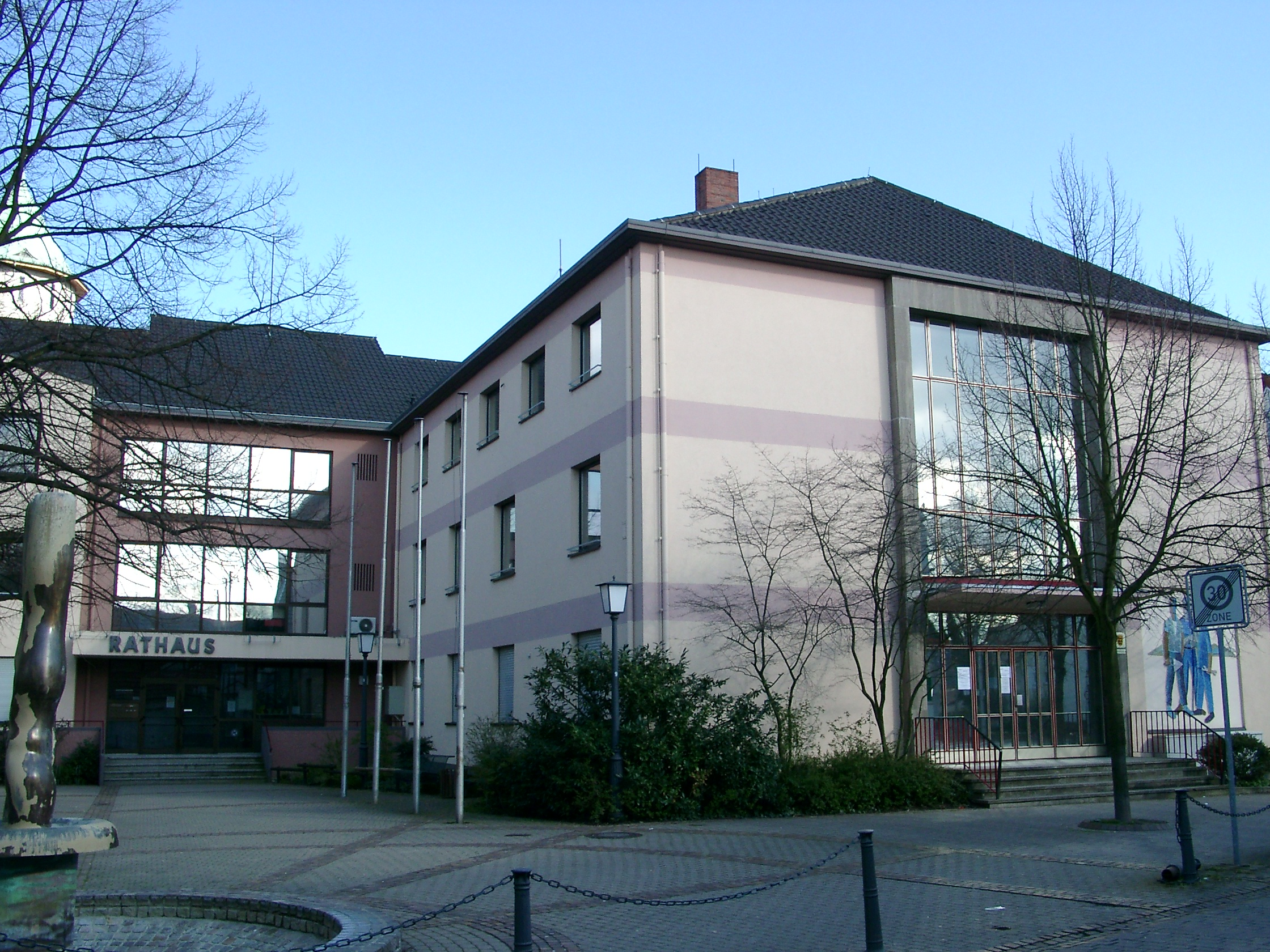 Eppelheim, Rathaus